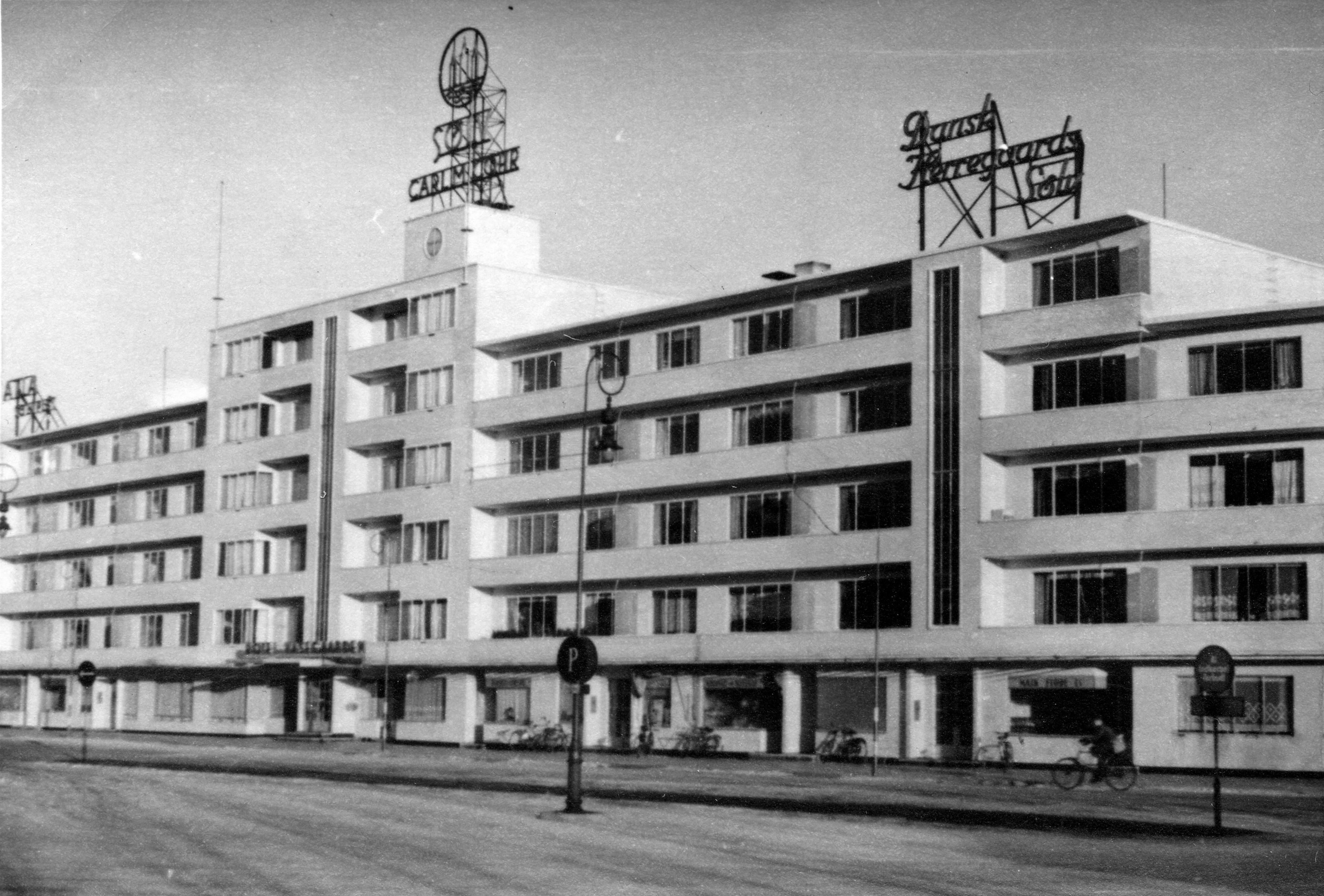 Format: Svart-hvitt fotopositiv Dato / Date: ca. 1942 Fotograf / Photographer: Fridolin Zint (1907 - 1985) Sted / Place: Antatt Fredericia, Danmark Wikipedia: Carl M. Cohr's Sølvvarefabriker Eier / Owner Institution: Trondheim byarkiv, The Municipal Archives of Trondheim Arkivreferanse / Archive reference: Tor.H49.B07.FZ043 Merknad: Bilder donert til Trondheim byarkiv av Joachim Zint, sønn av ingeniør Fridolin Zint (1907 - 1985). Fridolin Zint tjenestegjorde i Trondheim 1942 som Gefreiter ved Festungs-Pionier-Kommando XVI (Feldpostnummer 42399). I perioden 21.01.1942 - 31.07.1942 var han innkvartert i Trondhjems borgerlige Realskole. Billedsamlingen viser bl.a. reisen fra militærleiren i Zerbst i Tyskland til Trondheim via Danmark og Kattegat, brannen i Harmonien 27.01.1942 og avreisen fra Norge via Oslo og tilbake til Tyskland sommeren 1942. Flere av bildene er fargefotografier. I etterkant av tjenestetiden i Trondheim ble Fridolin Zint teknisk inspektør i Wehrmacht og steg i gradene inntil han ved krigens slutt var oberleutnant.